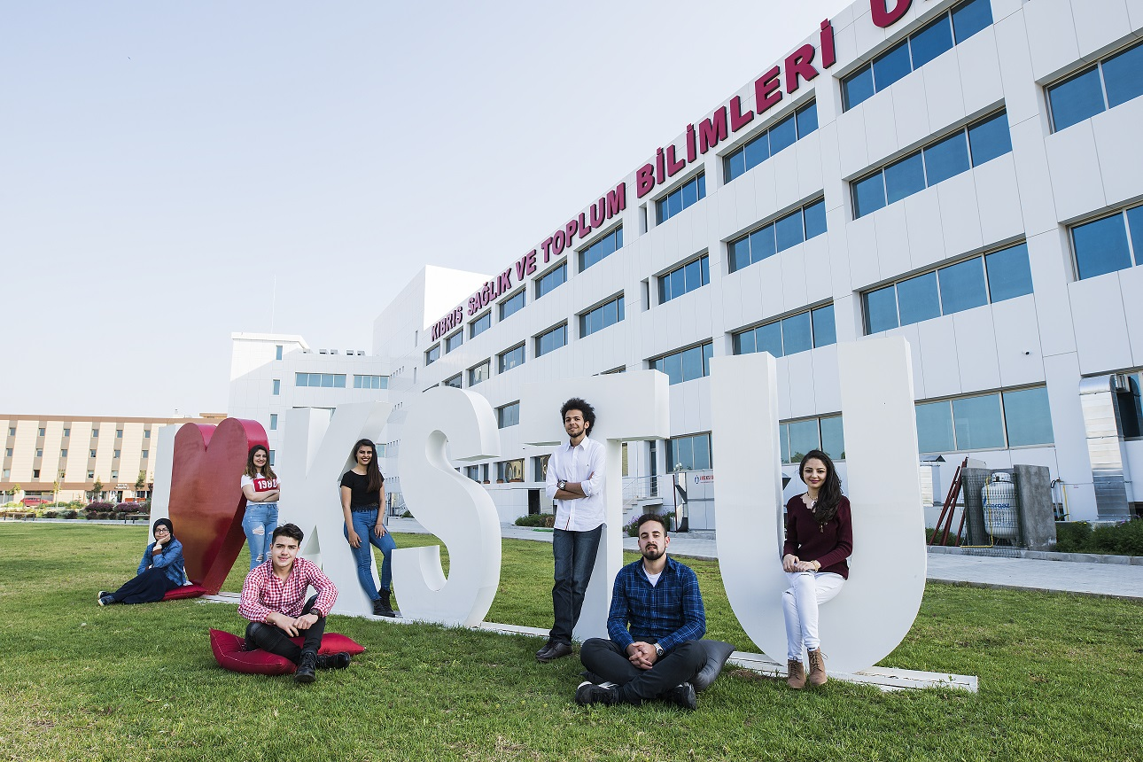 KSTU Kampüsü